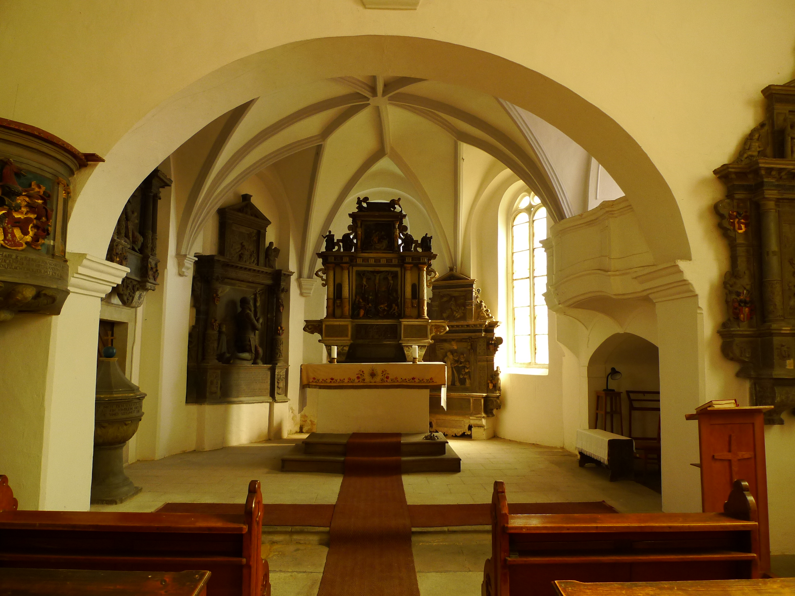 Kostel svatého Václava, Valtířov.